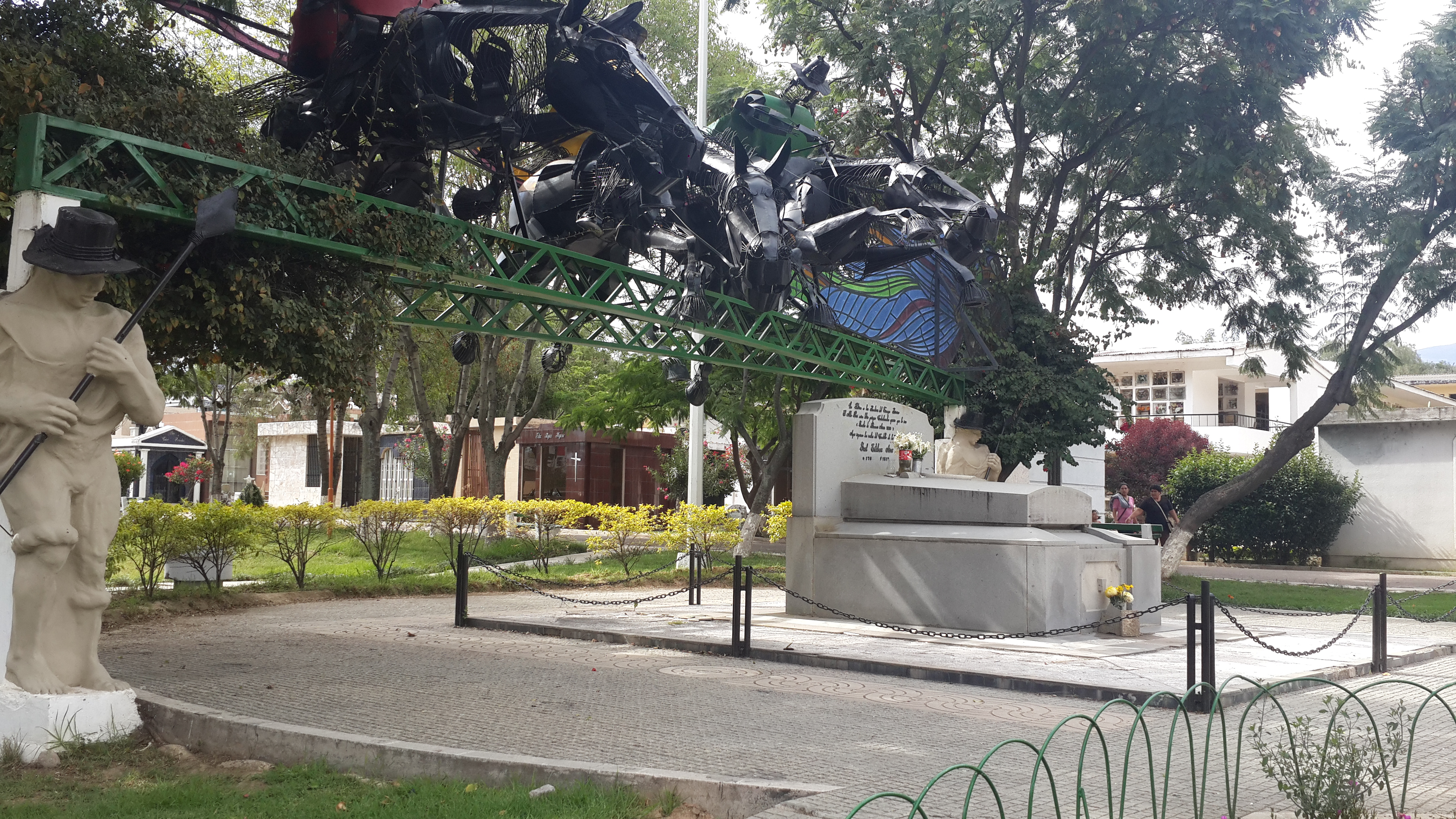 Cementerio General de Cochabamba Monumento a Esteban Arze This medium shows the protected monument with the number C/F0-001 in Bolivia.